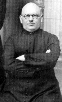 Вінцэнт Гадлеўскі